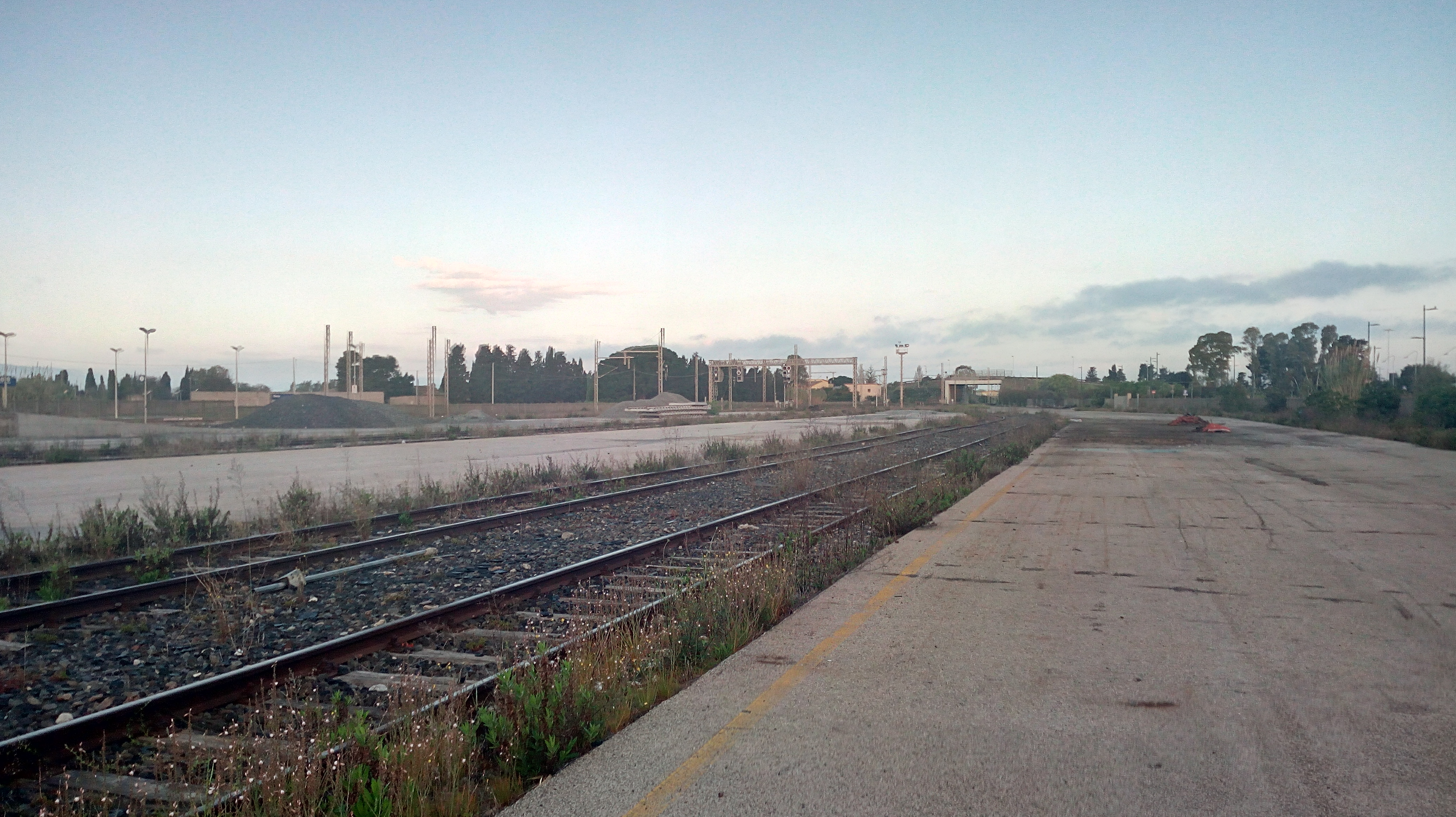 L'ex scalo merci della stazione ferroviaria di Elmas.